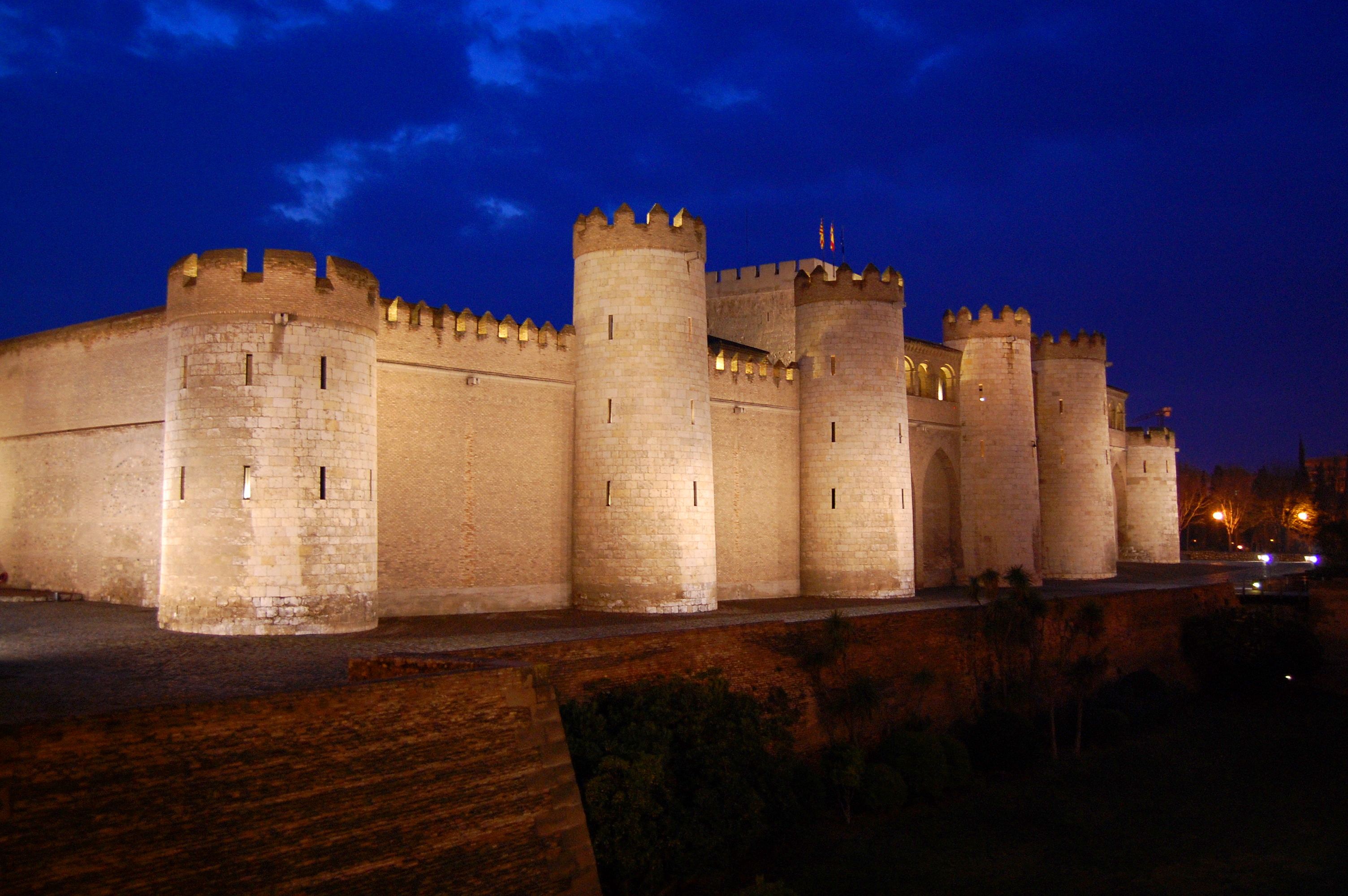 Palacio de la Aljafería. Fachada